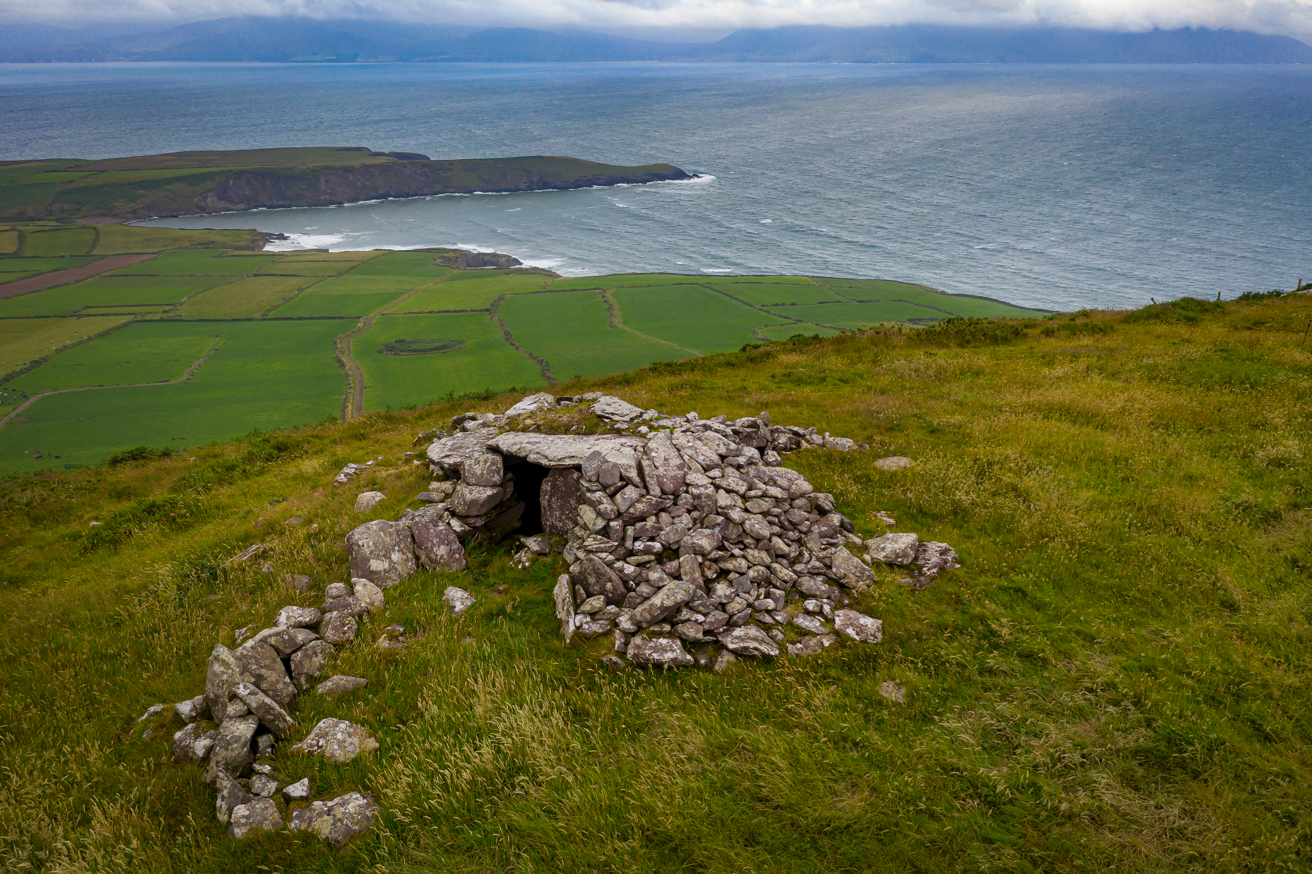 Wedge Tomb von Doonmanagh, Drohnenaufnahme